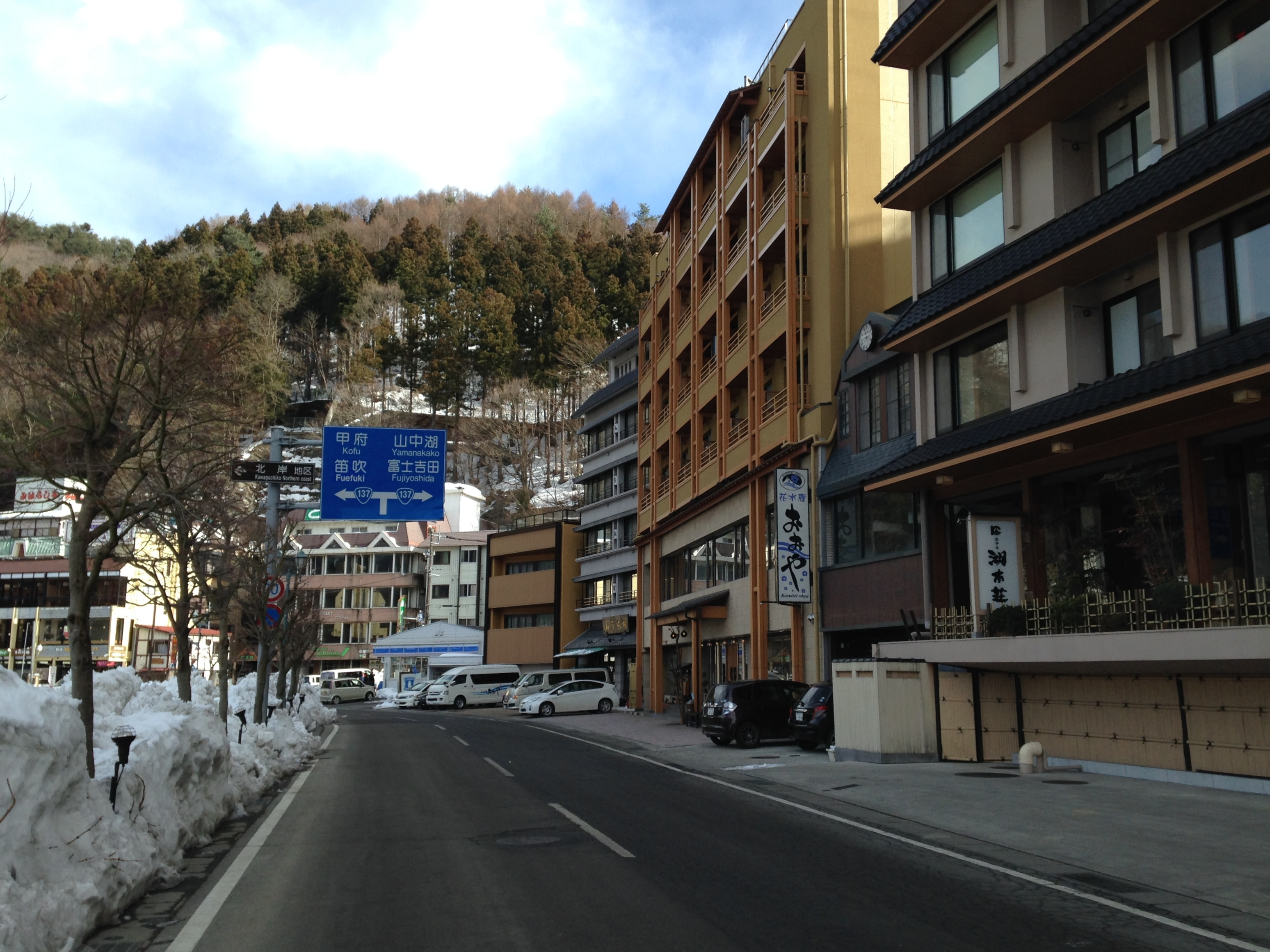 河口湖の近くを通る山梨県道710号